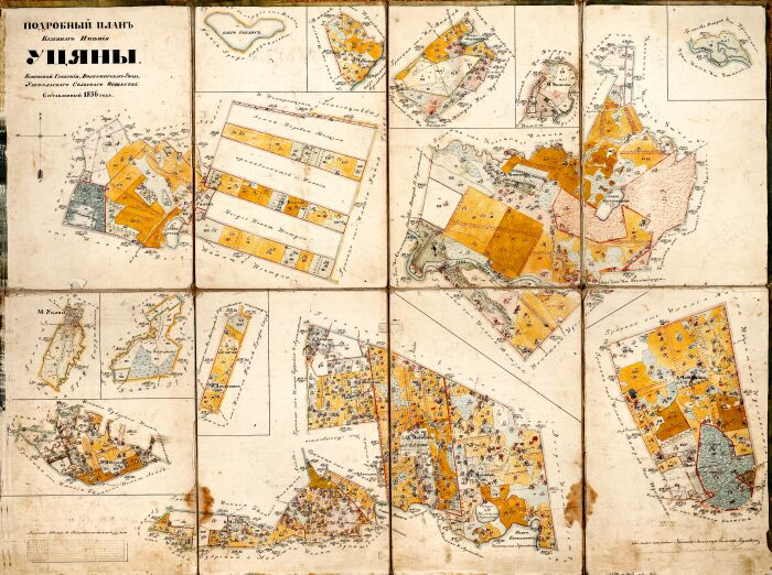 Utenos dvaro planas 1856 m.